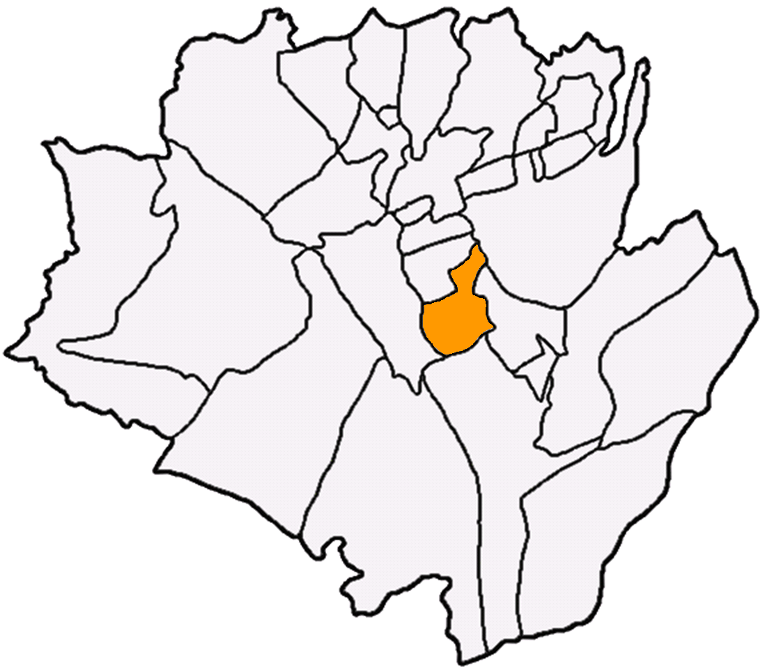 上華里在龍潭區 (台灣)中的位置